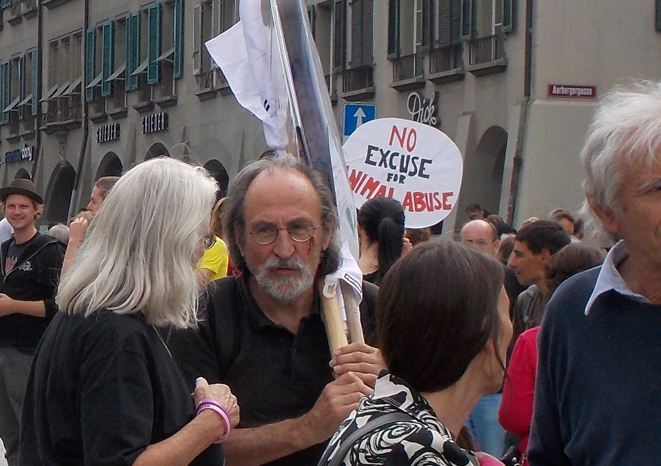 Schweizer Tierrechtler Erwin Kessler vom "Verein gegen Tierfabriken" an einer Tierrechtsdemonstration im Juli 2014 in Bern. (Blutspuren sind Schminke)